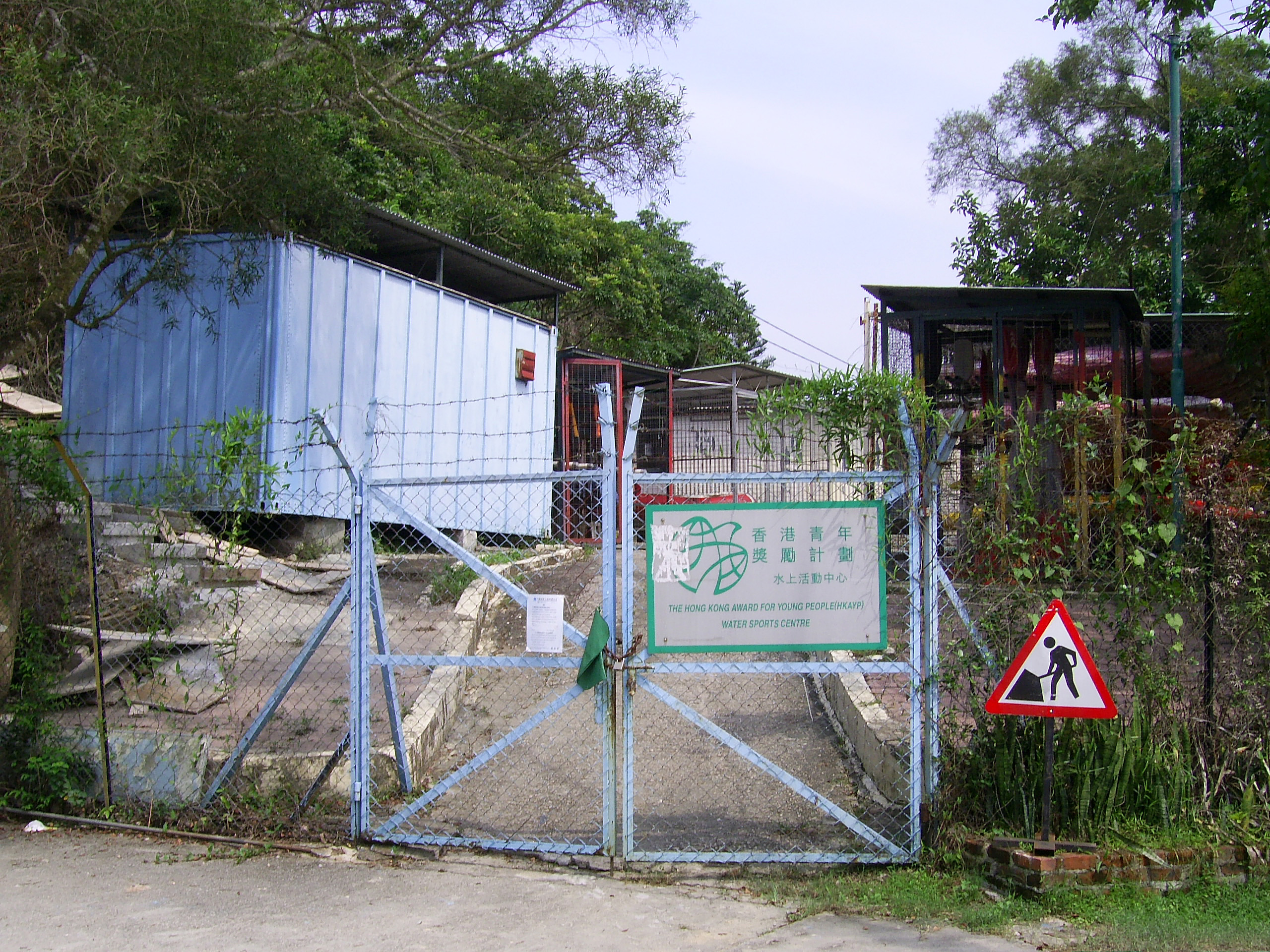 中文（香港）: 香港青年獎勵計劃水上活動中心